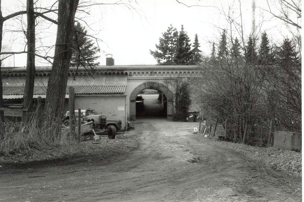 Der Eingang von Fort I, eigenes Bild, copyright: GNU FDL